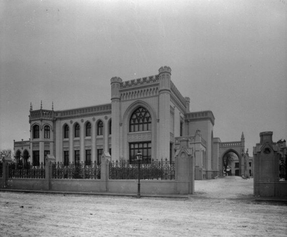 Ф.О.Шехтель. Особняк З.Г.Морозовой на Спиридоновке 1893-1879 г.г.